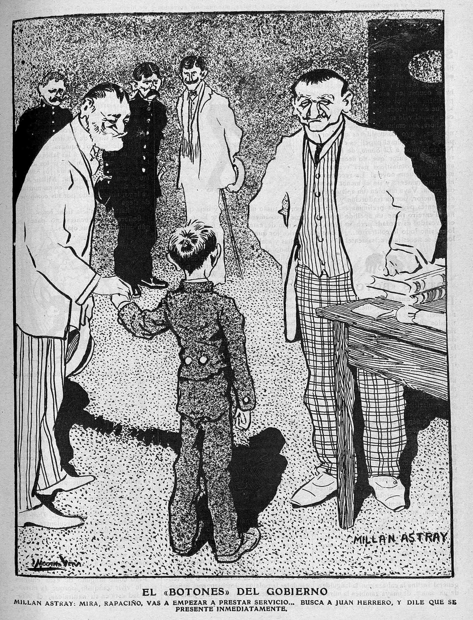 El "botones" del gobierno.